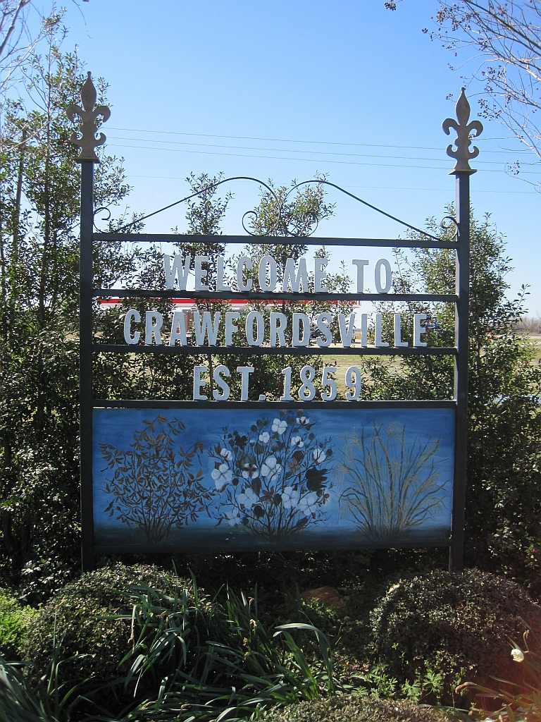 Crawfordsville, Arkansas.